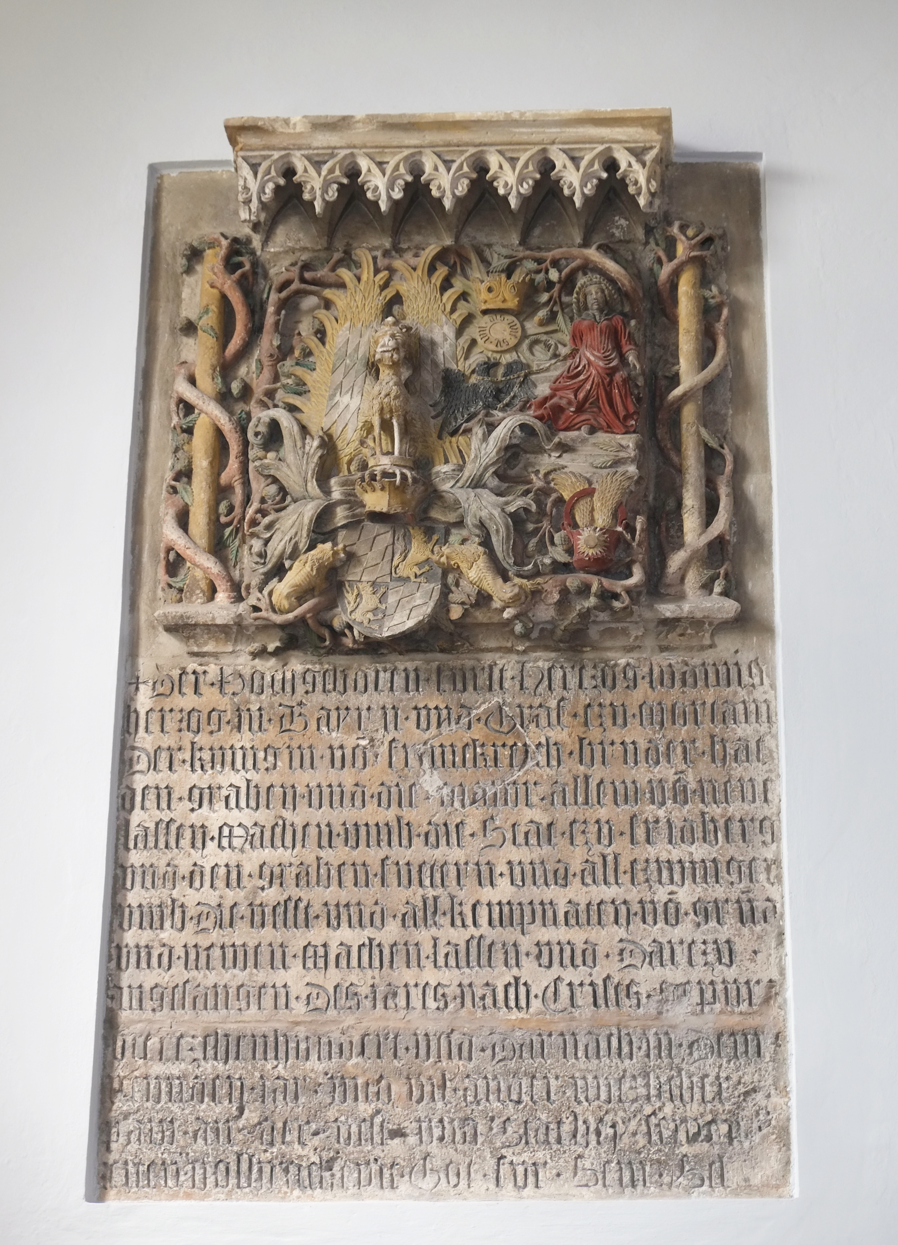 Kirche St. Jakob in Friedberg im Landkreis Aichach-Friedberg (Bayern, Deutschland)